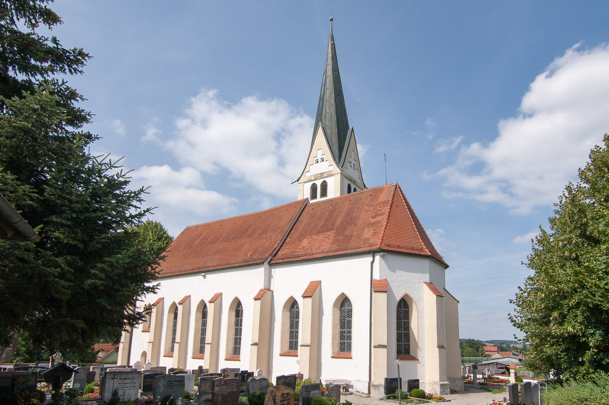 Pfarrkirche Mariae Himmelfahrt; 15. Jahrhundert; mit Ausstattung. - Friedhofsmauer aus unverputztem Backstein, 18./19. JahrhundertThis is a photograph of an architectural monument.